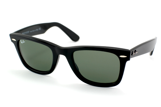 Die originale "Wayfarer"-Brille von Ray Ban.